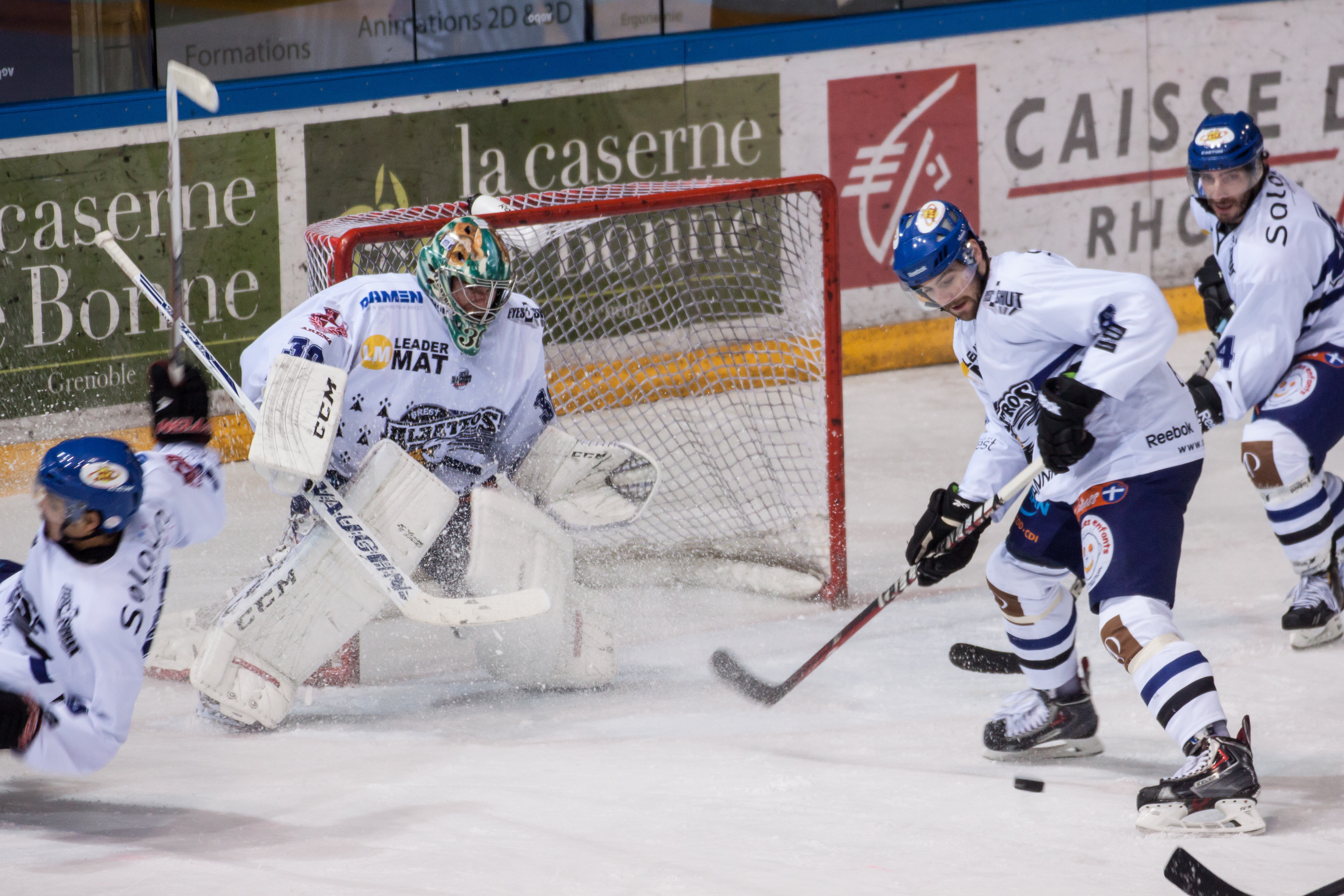 Les Albatros de Brest défendant le but gardé par Arnaud Goetz lors du match Grenoble-Brest à la Patinoire Polesud.